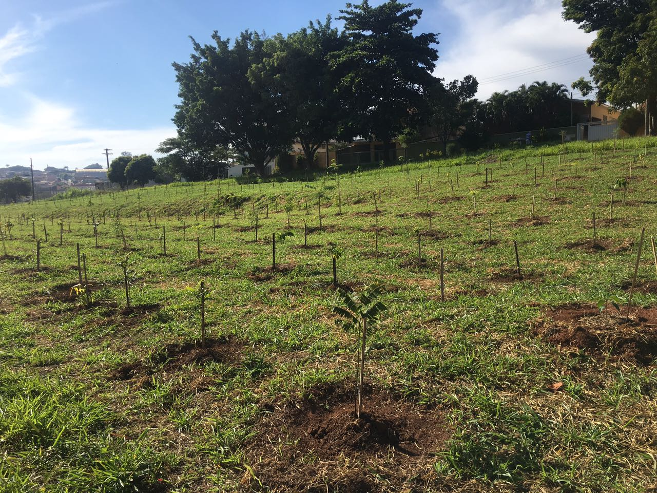 Plantio realizado no dia 21 de Janeiro de 2018.